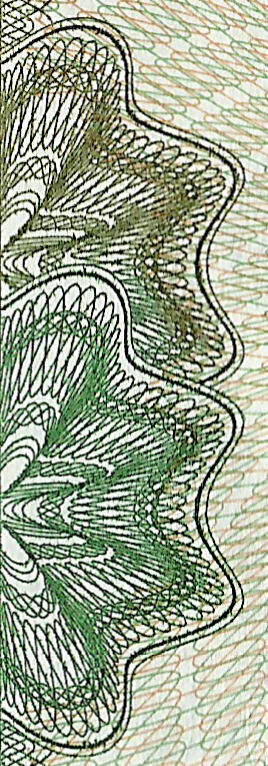 Ausschnitt einer Guilloche auf einem alten 5-DM-Schein (Deutsche Bundesbank, Design 1963)